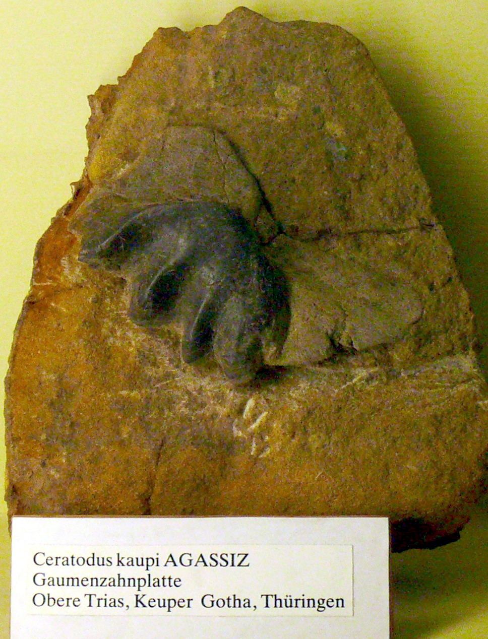 Ceratodus kaupi, Gaumenzahnplatte, Upper Trias, Keuper, Gotha, Thüringen, Germany